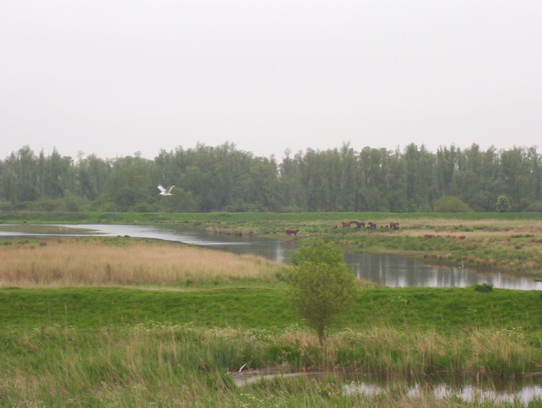 Zicht op deel van het natgehouden land in de Biesbosch, mei 2004. Eigen foto, gebruik vrij